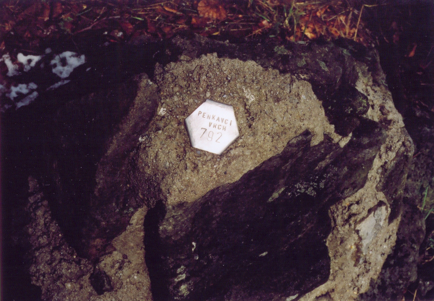 Pěnkavčí vrch v Lužických horách, vrcholová značka